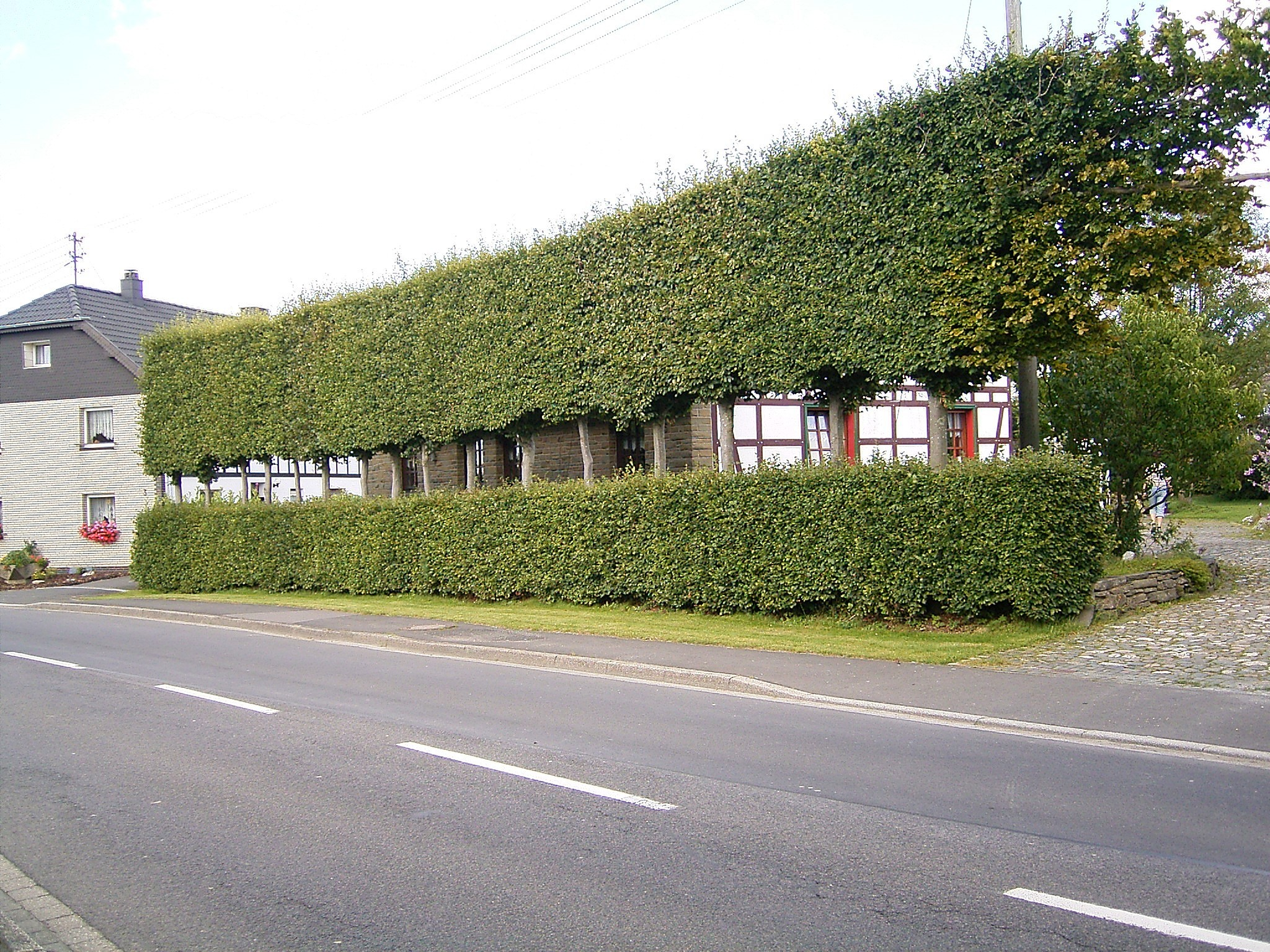 Monschauer Heckenland